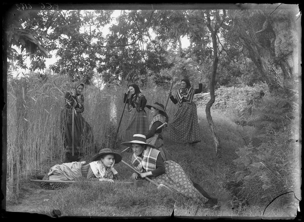 Reproduction numérique de l’œuvre Les Sarcleuses, réalisée par Félix Arnaudin à Lüe Grué le 10 juin 1894 selon la technique du gélatino bromure d'argent sur plaque de verre (13 x 18 cm)